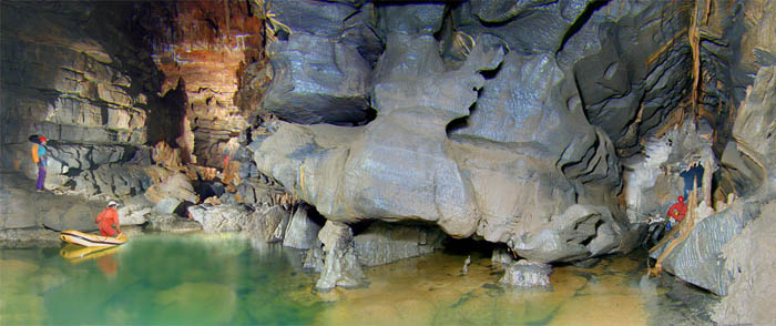 Nova Križna jama - raziskovanje jame